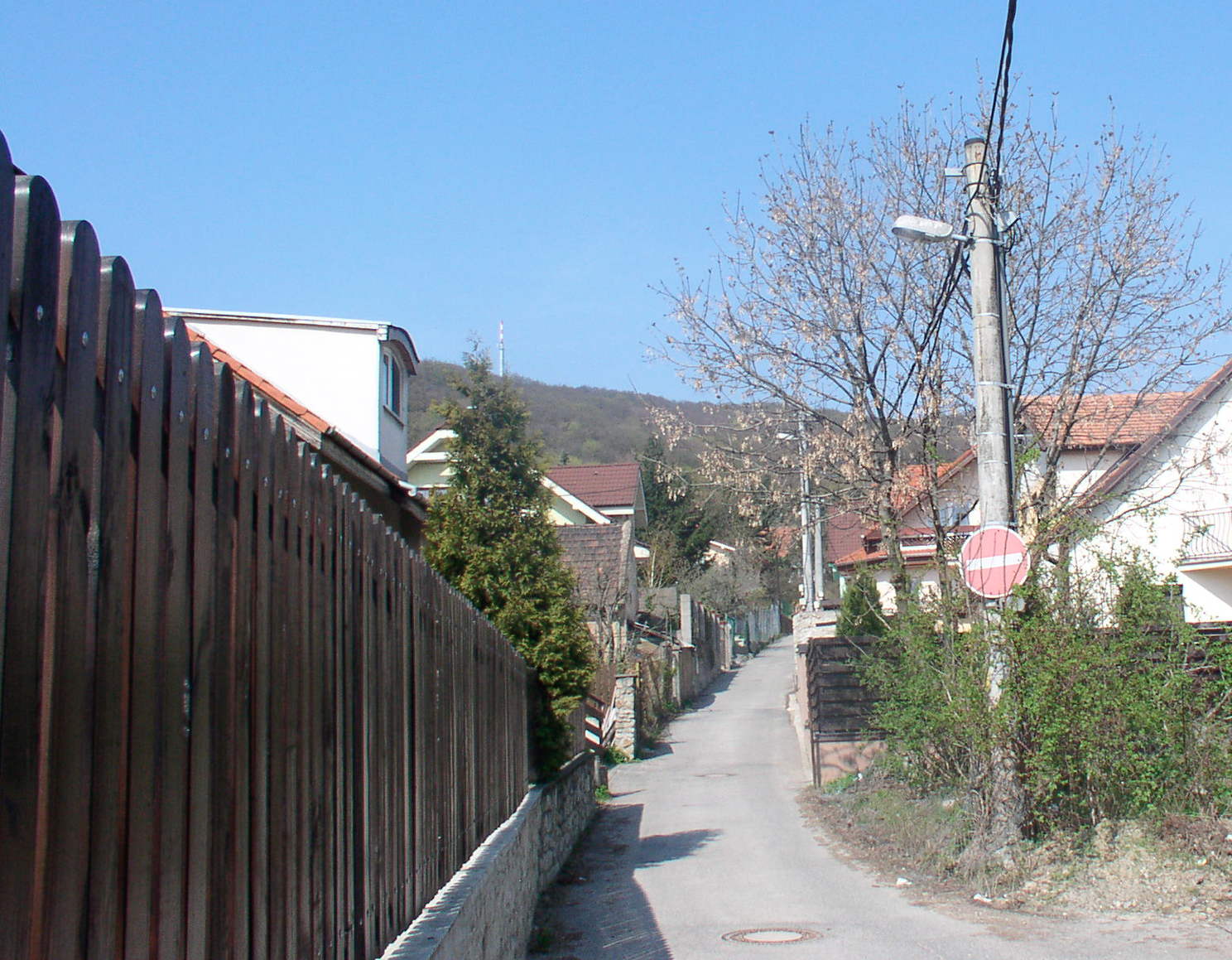 Oblasť Ahoj v hlavnom meste SR Bratislava, v jeho Mestskej časti Bratislava-Nové Mesto v okrese Bratislava III.